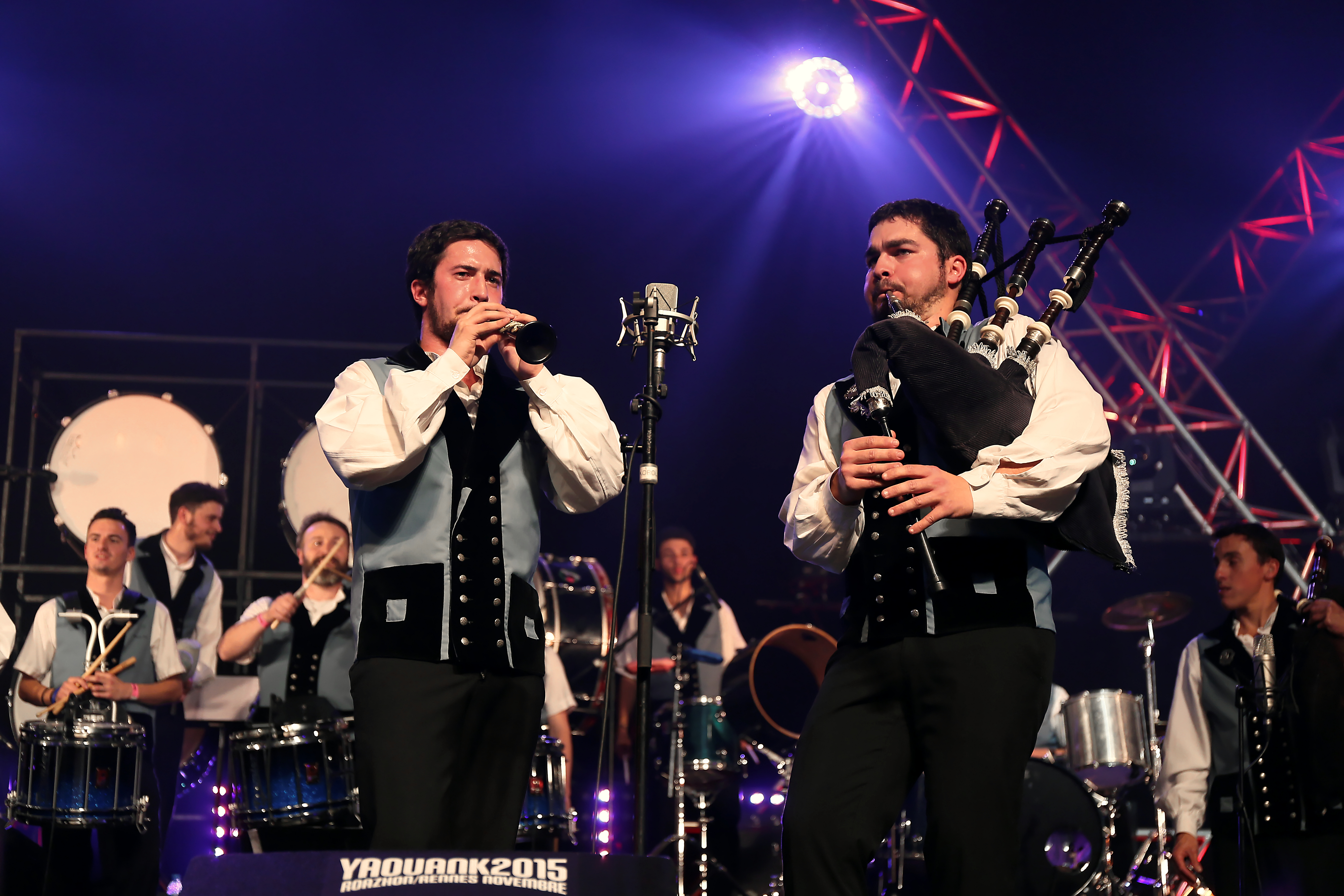 Le Bagad de Vannes Melinerion avec son spectacle Contrechamps et en fest-noz lors du festival Yaouank le 21 novembre 2015 au Parc des Expositions de Rennes.